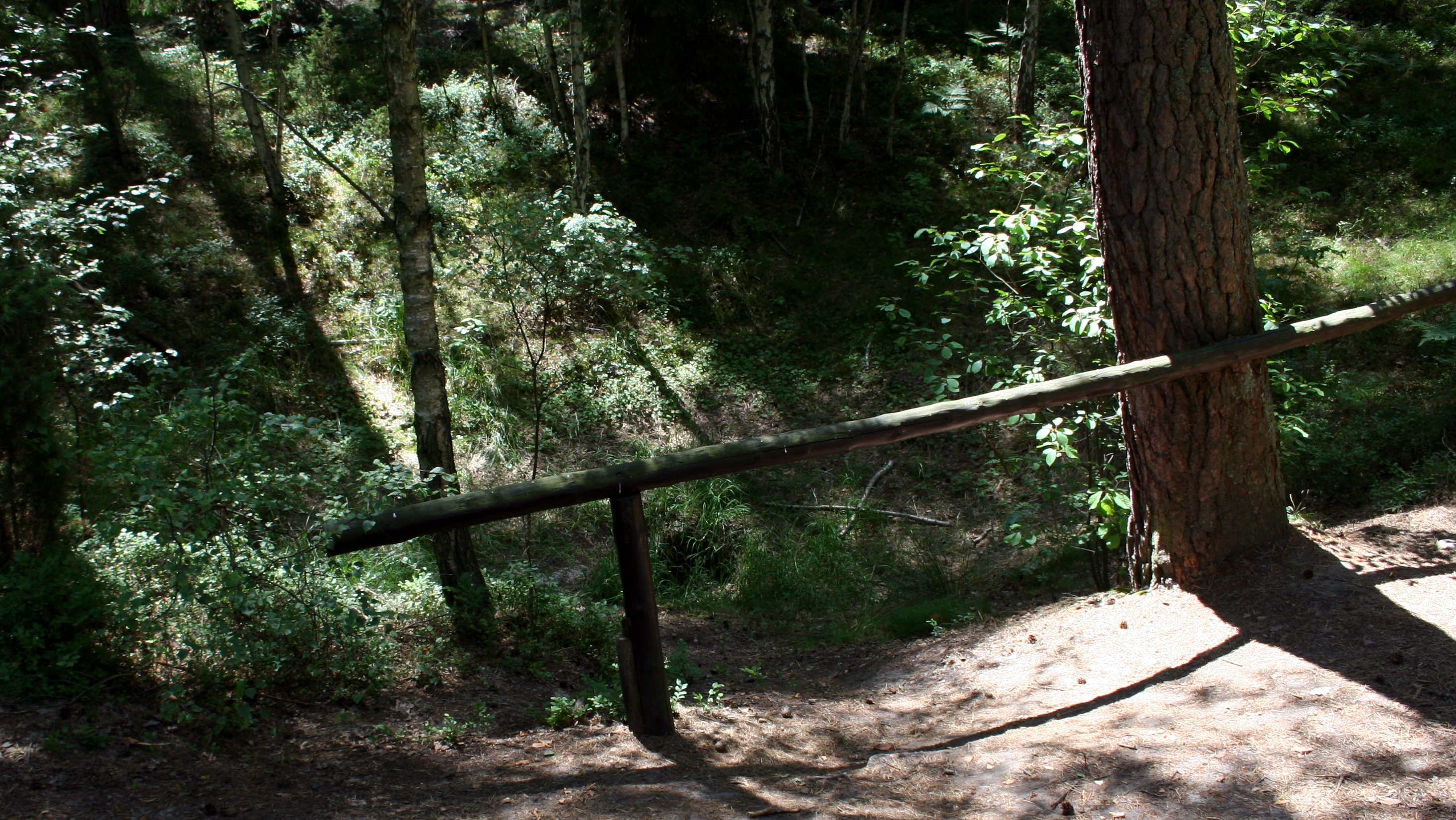 wytopisko polodowcowe na cmentarzysku Gotów w Odrach, gmina Czersk